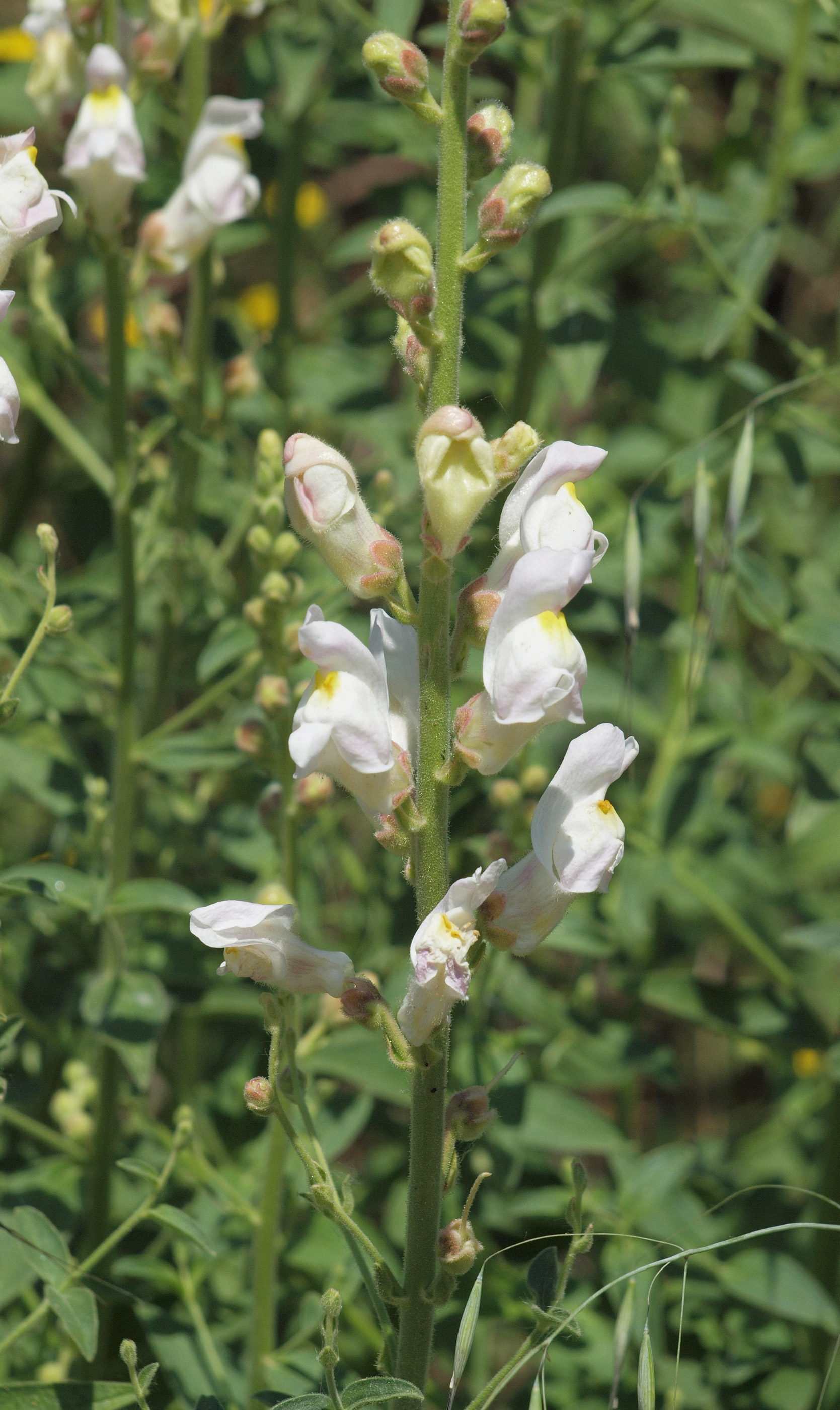 Antirrhinum graniticum. Losar de la Vera (Cáceres, España).